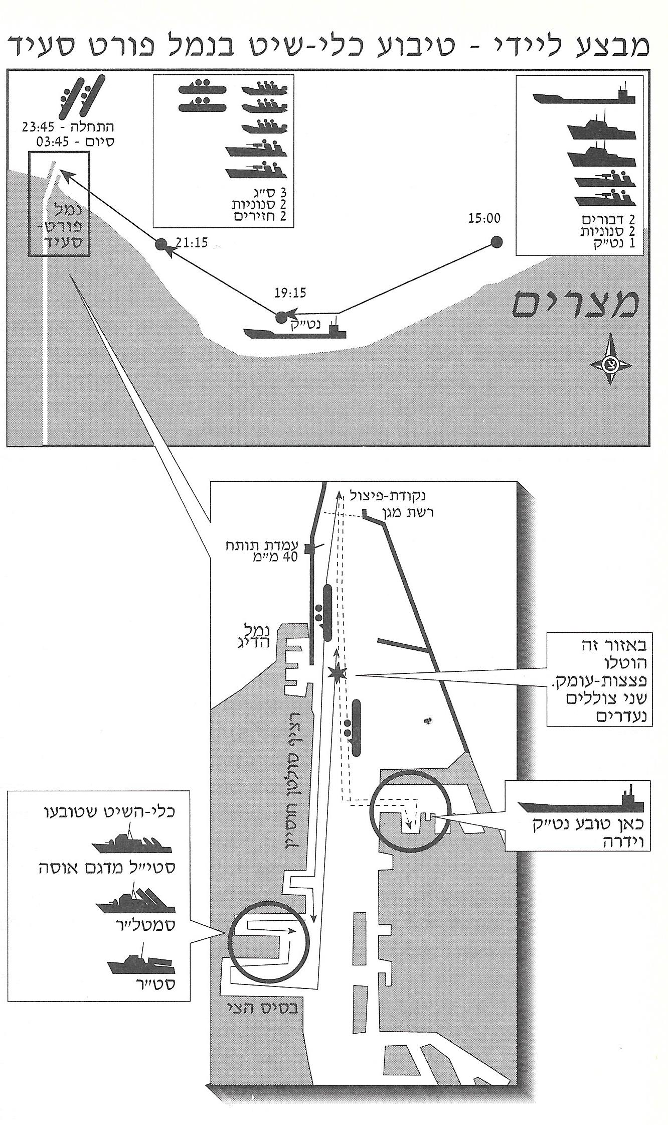 מבצע ליידי פעולת צוללים בנמל פורט סעיד במהלך מלחמת יום הכיפורים.